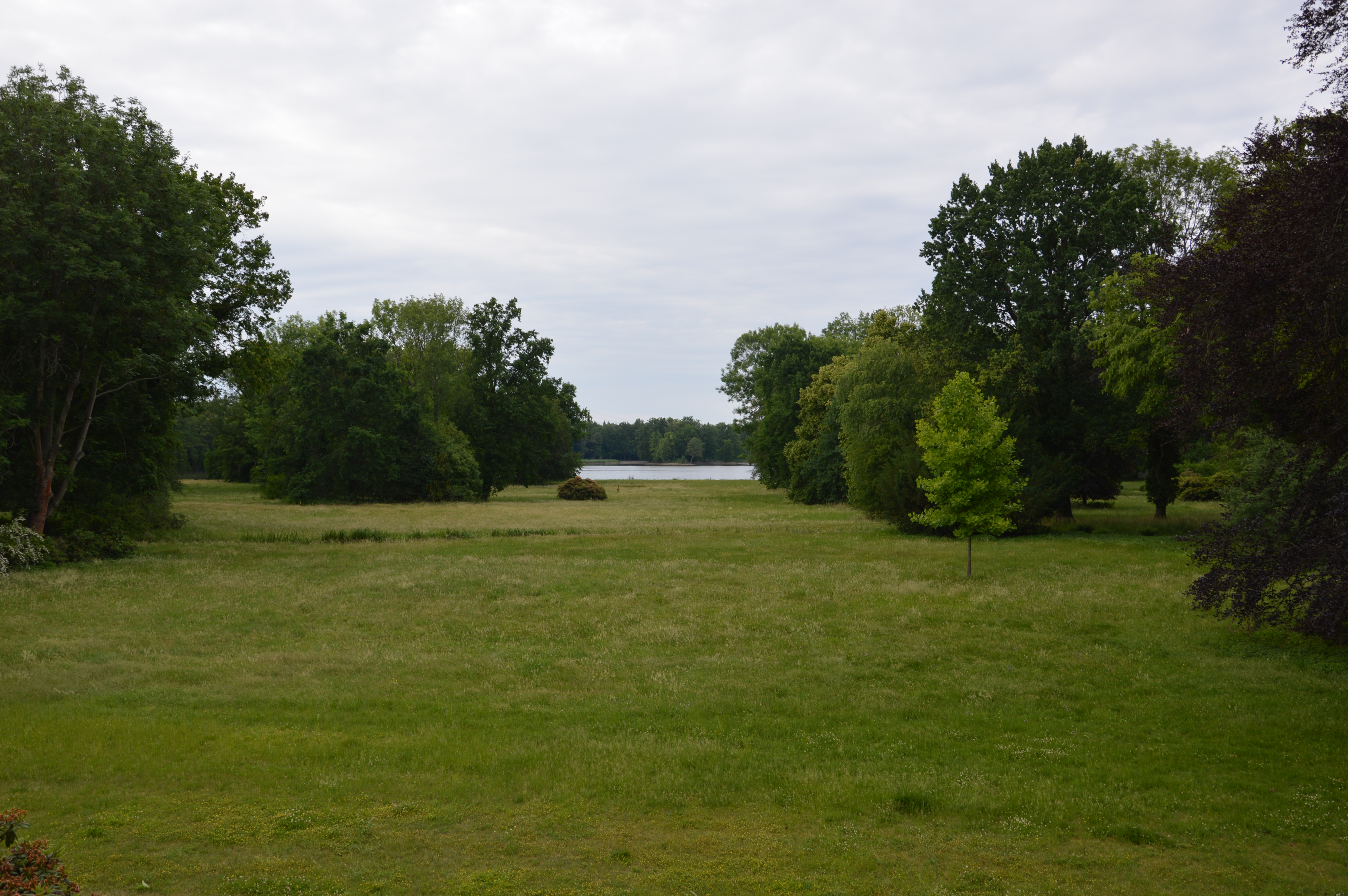 Schlosspark Altdöbern, Blick von der Terrasse des Schlosses zum Salzteich